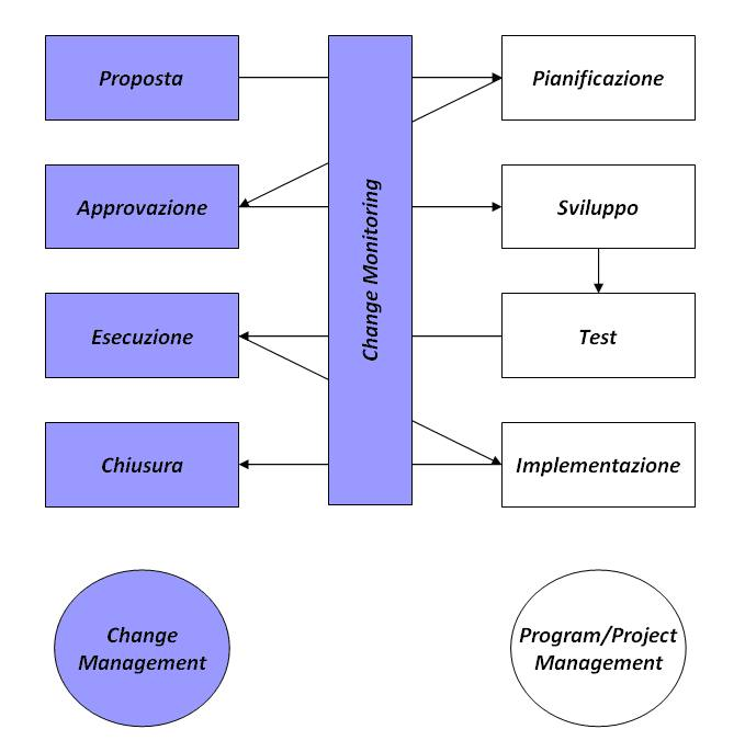 Relazioni tra i processi di Change Managemen e di Program/Project Management